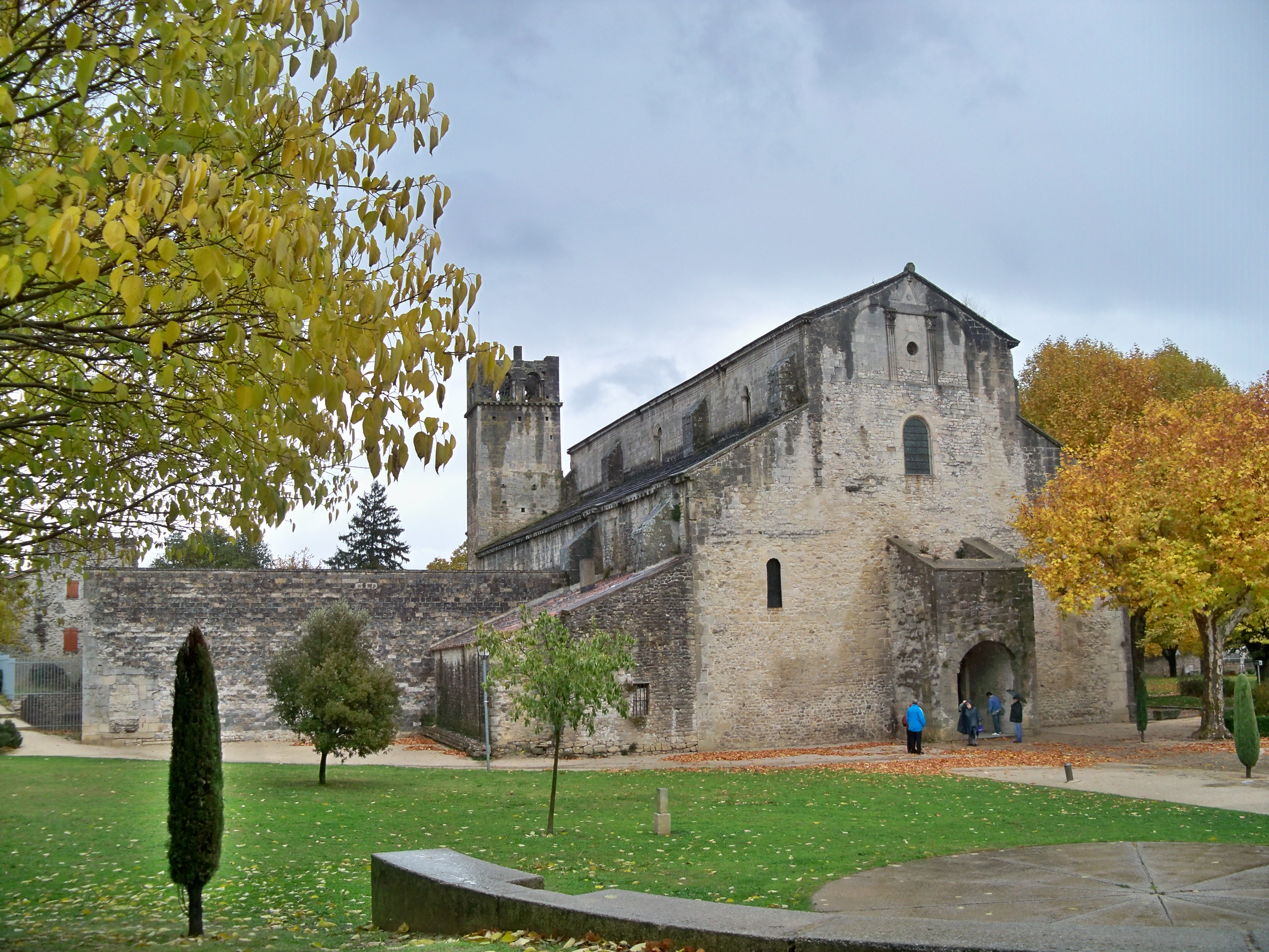 Faade de la Cathédrale Notre-Dame-de-Nazareth de Vaison la Romaine (Vaucluse, France)